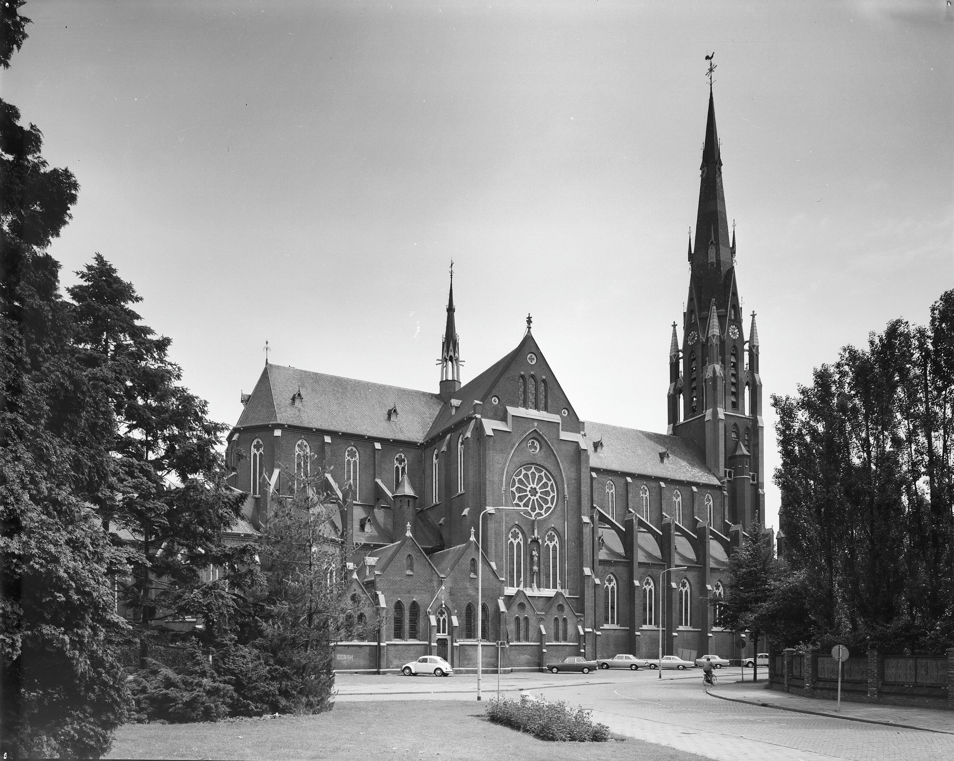 Rooms-Katholieke Kerk: exterieur koor